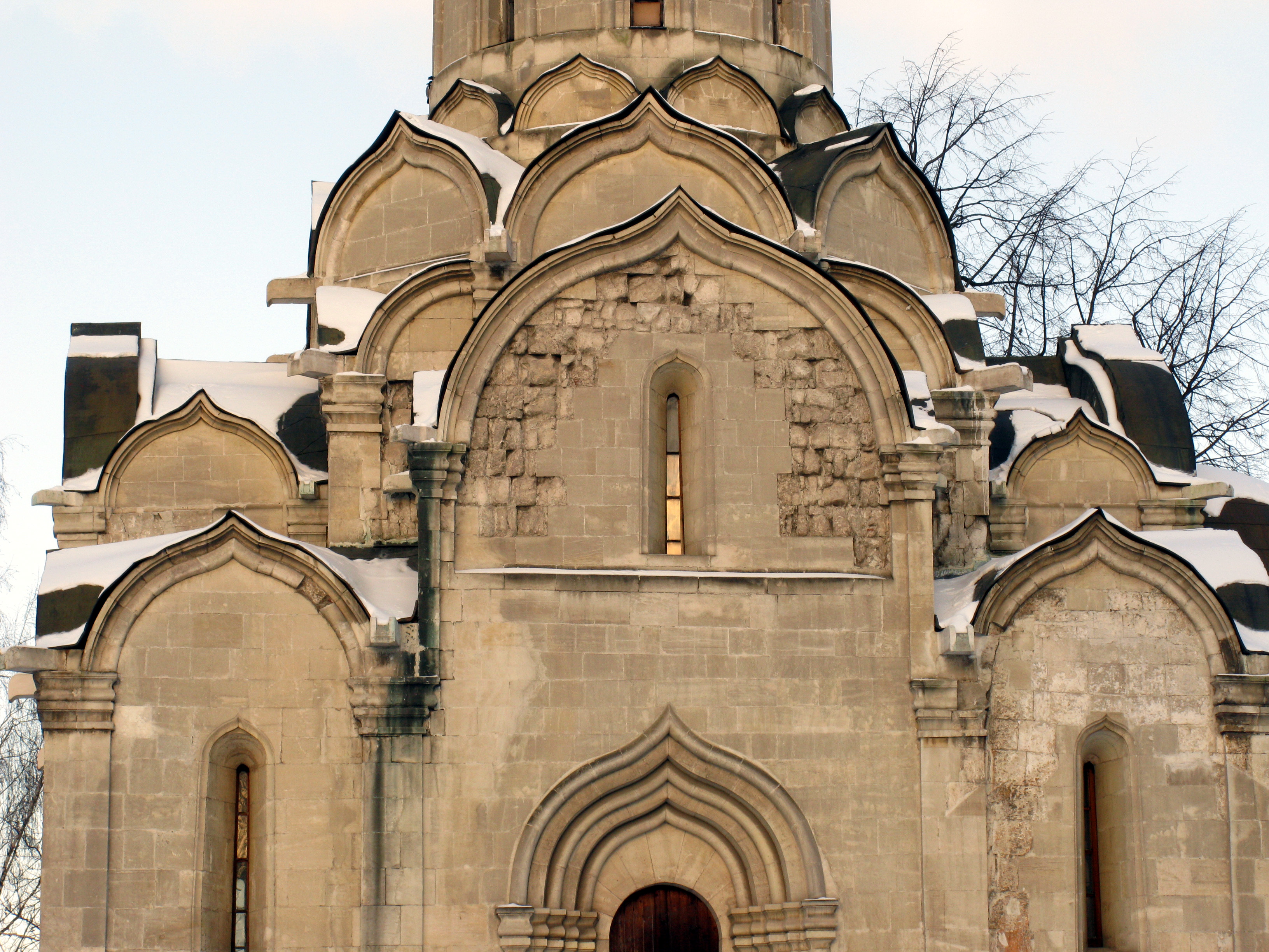 Спасский собор (Андроников монастырь)